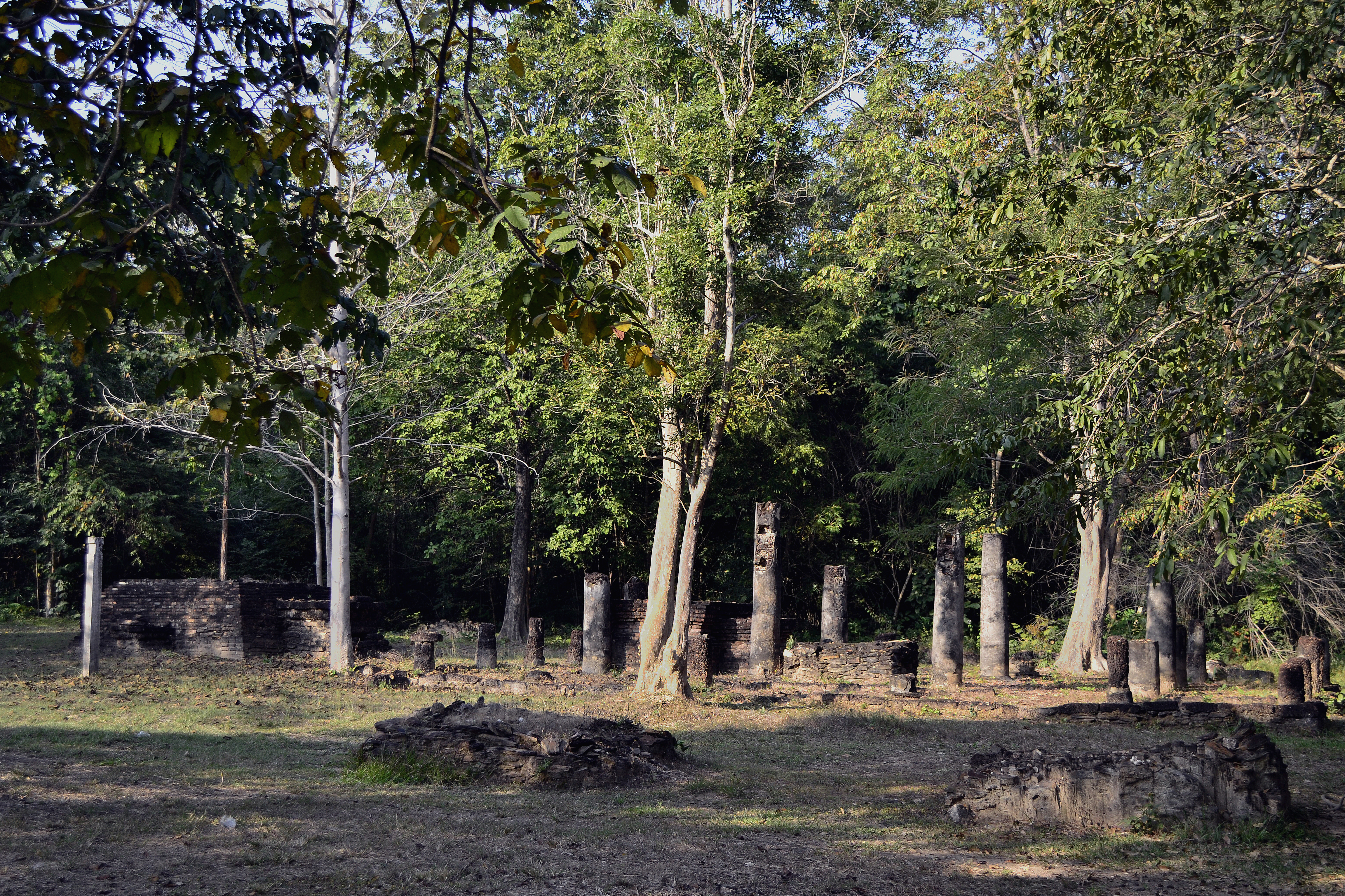 Wat Aranyik im Geschichtspark Sukhothai